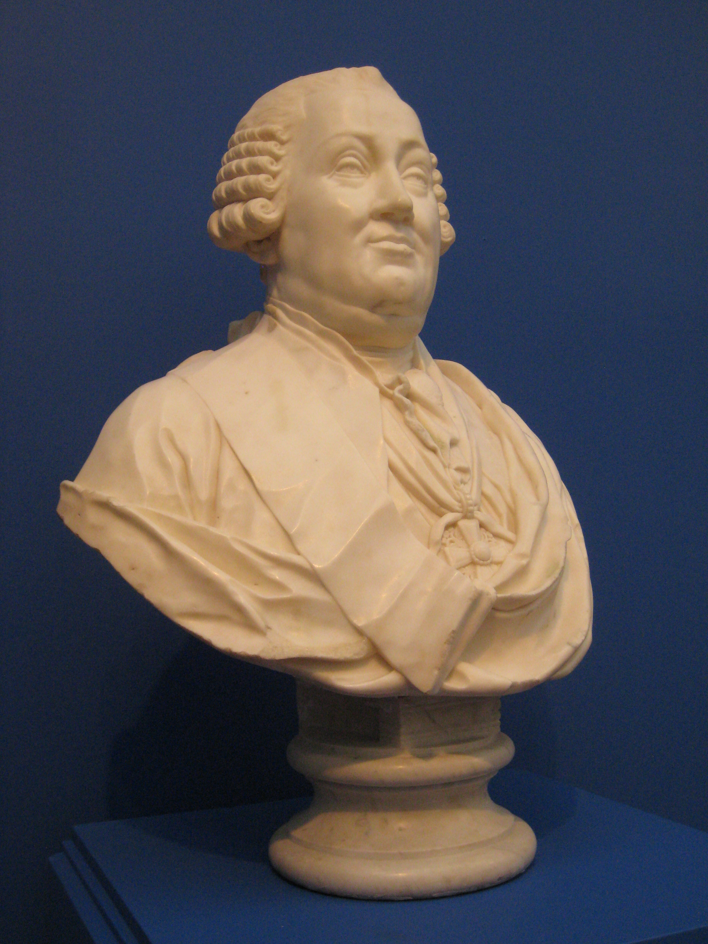 Я.И. Земельгак. Портрет князя Я.П. Шаховского. 1790-е. Мастерская Ф. Шубина, Россия. ГИМ. Мрамор